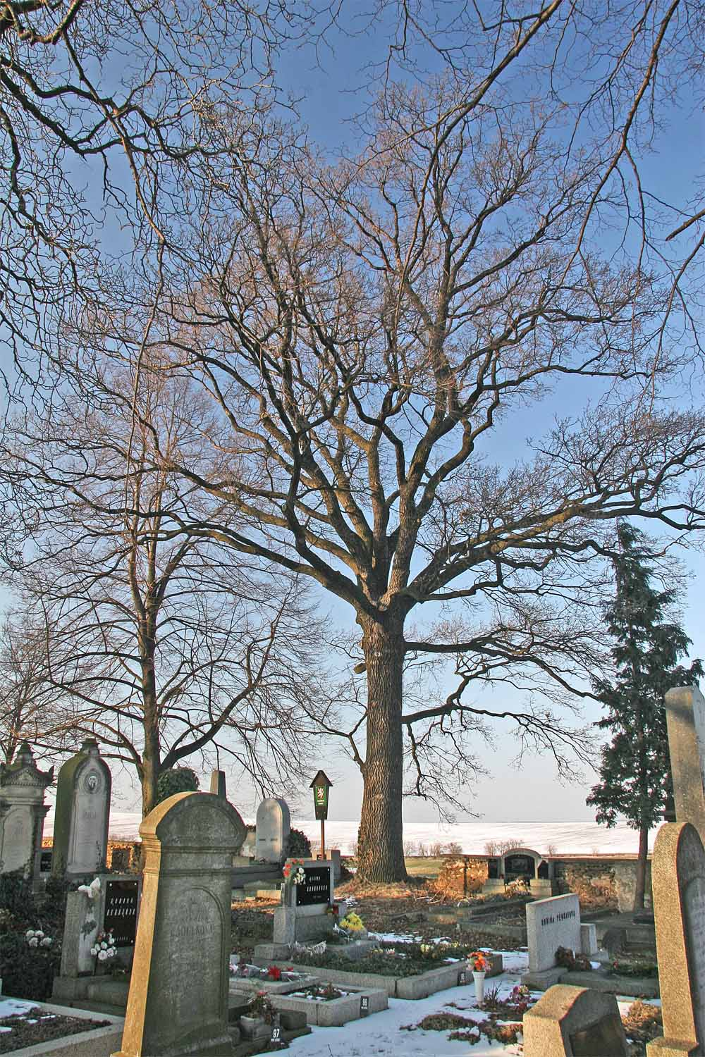 Památný dub na evangelickém hřbitově v obci Libenice